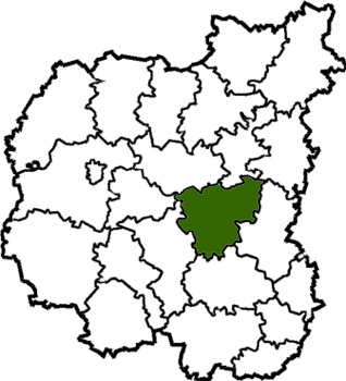 Borznyanskyi-Raion map